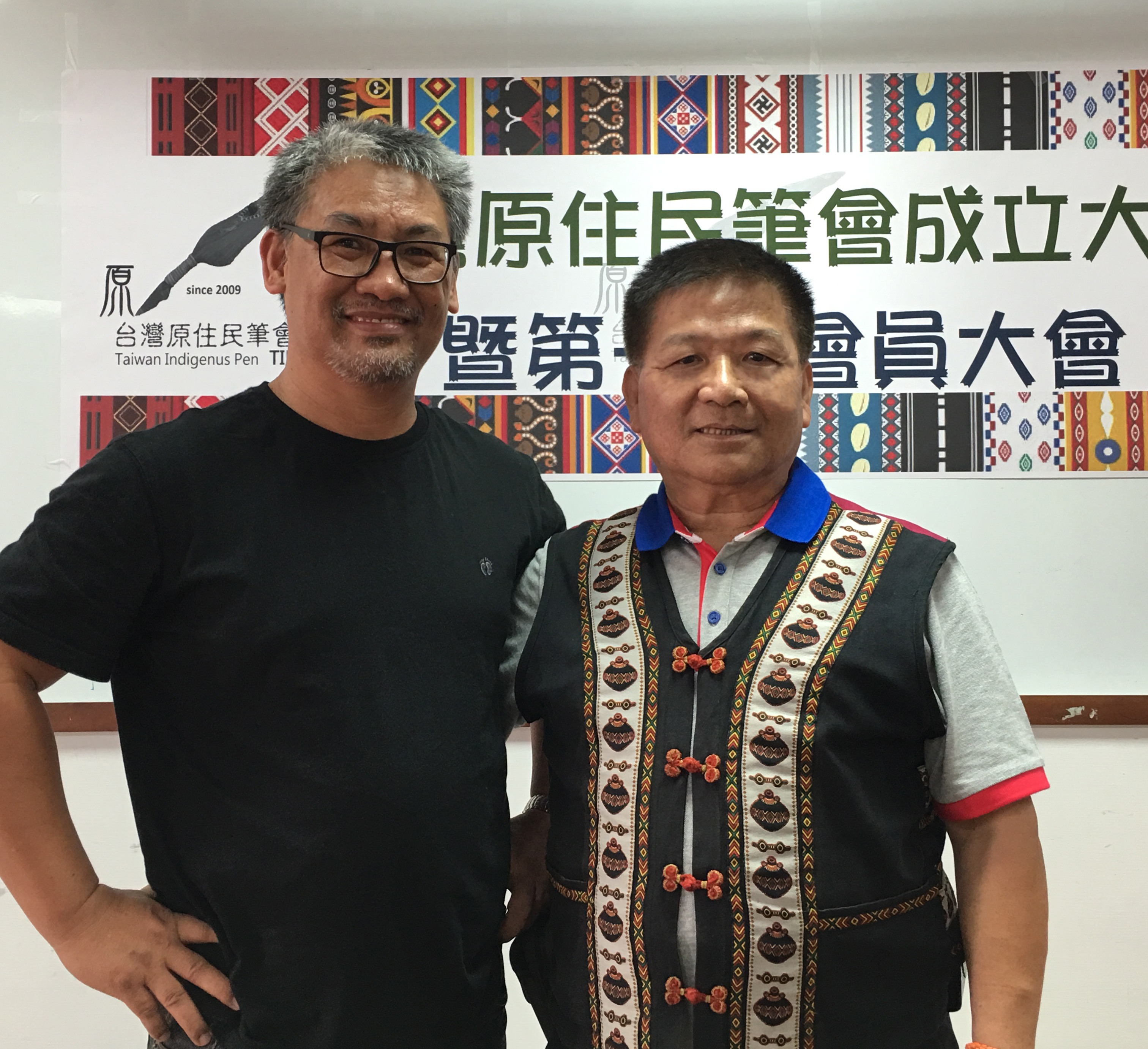 中文（台灣）: 「台灣原住民筆會」2016年6月25日在台北市耕莘文教院舉行成立大會後，台灣原住民卑南族的巴代與排灣族林德義(林歌)合照。